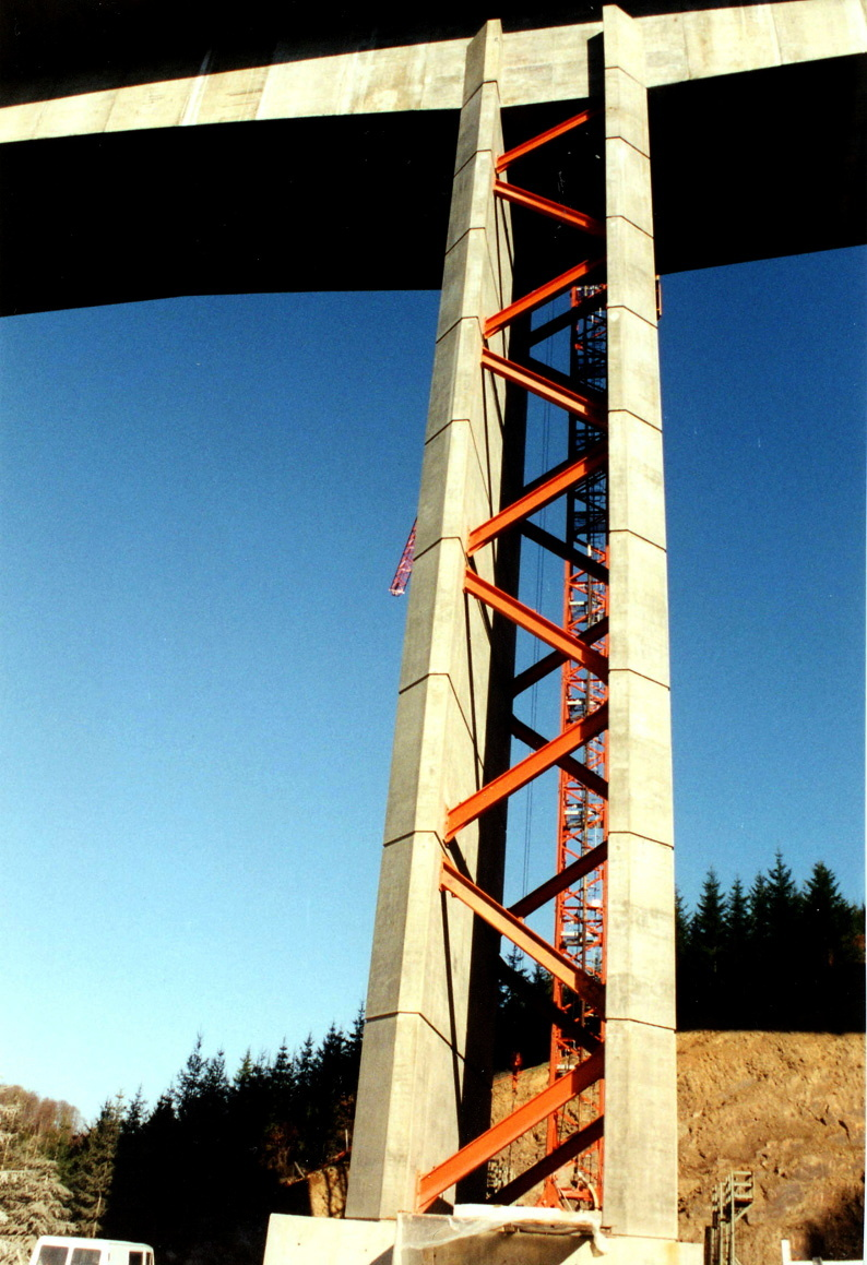 Viaduc de la Barricade - Pile P 3 terminée avec triangulation provisoire